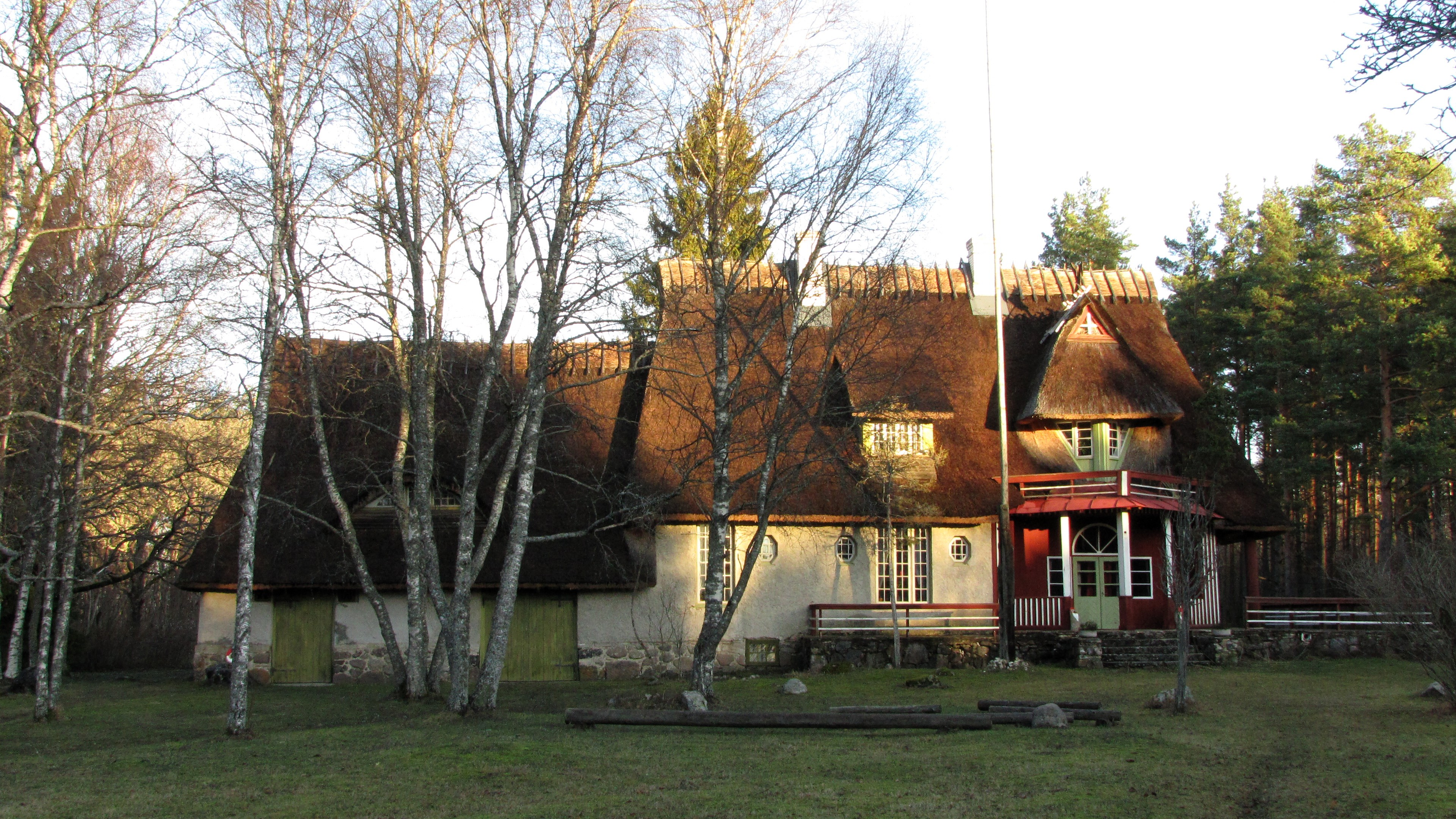 Ants Laikmaa kodukoht, Laipmani talu